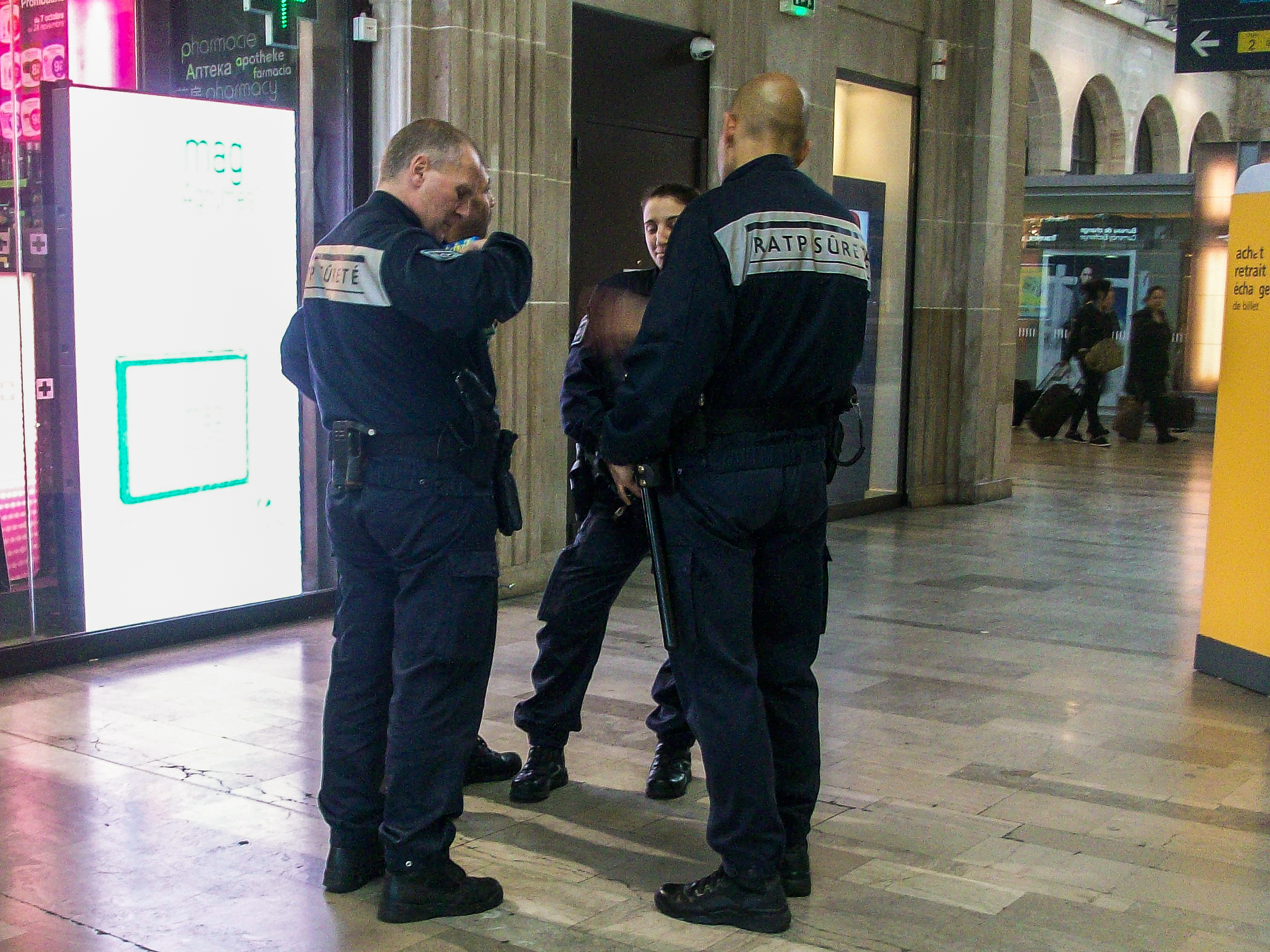 Agents du Groupe de protection et de sécurisation des réseaux, police de la RATP, en gare de l'Est